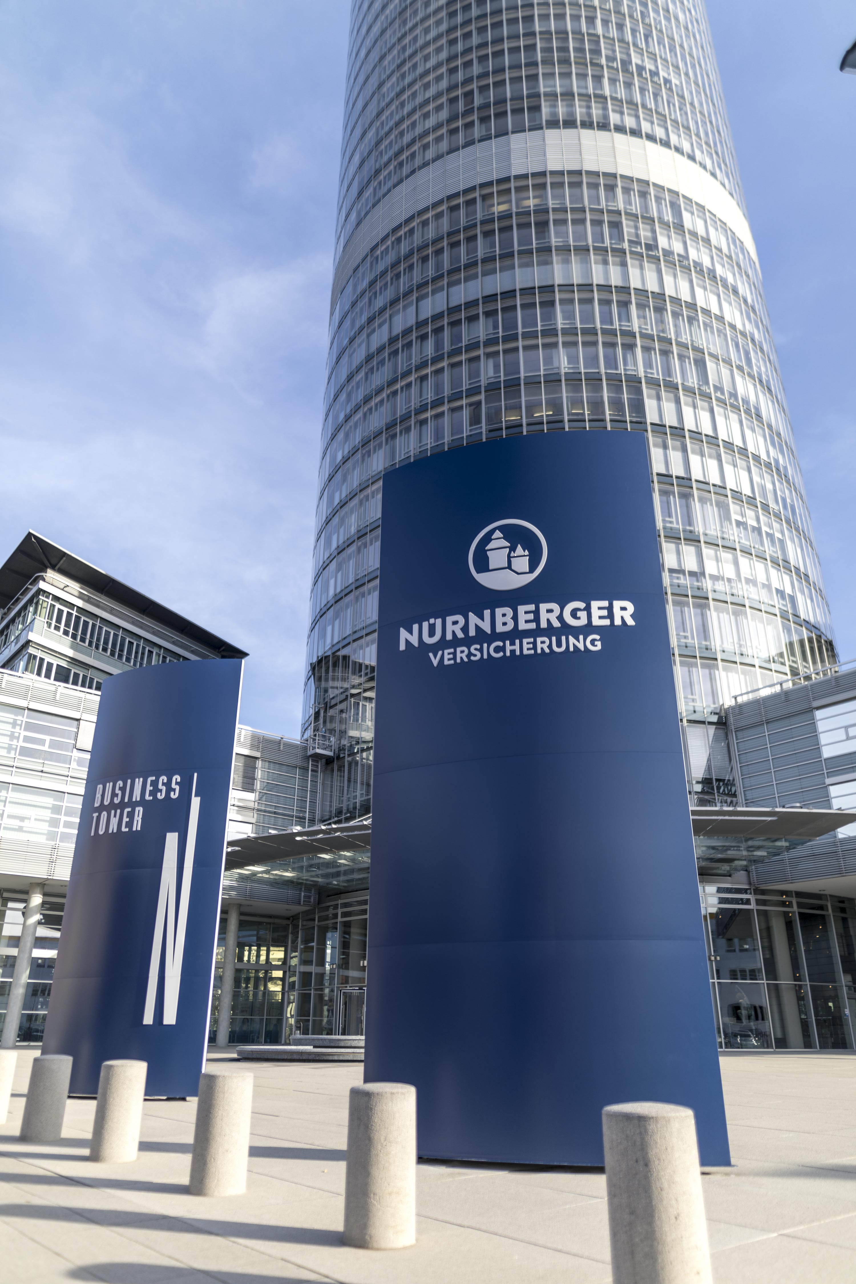 Frontansicht Business Tower Nürnberg